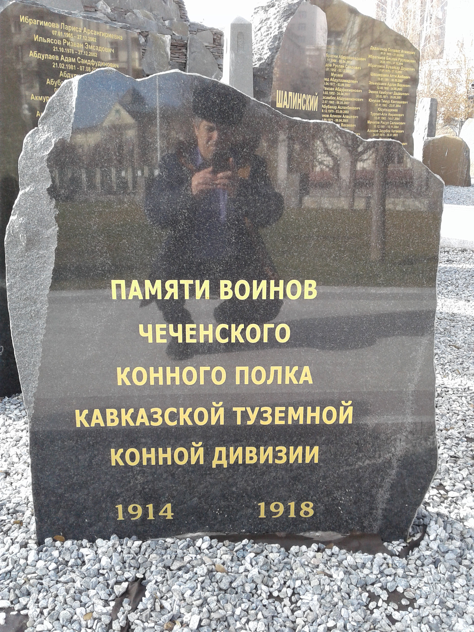 Мемориал памяти погибших в борьбе с терроризмом в Грозном